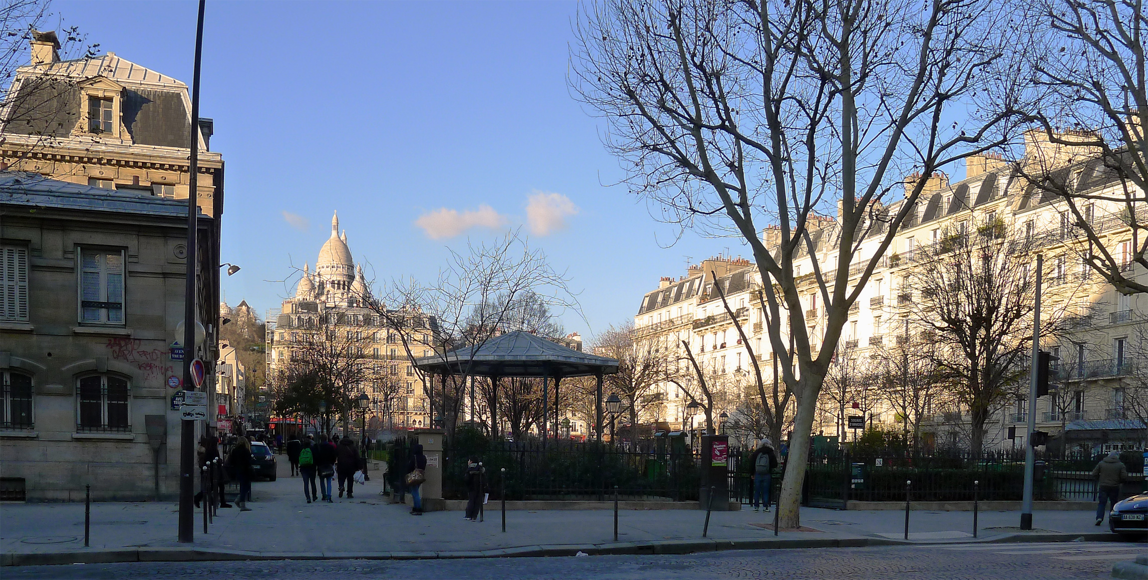 Place et square d'Anvers avec en arrière-plan le Sacré-Coeur - Paris IX